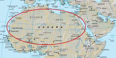 Deel van de kaart van Afrika van het CIA World factbook, met ruwweg de locatie van de Sahara aangegeven - dit is niet eenvoudig!